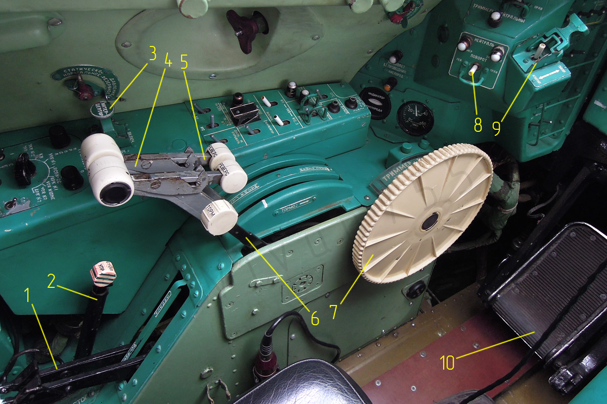 Органы управления Ту-134А на левом боковом пульте. 1 — рычаг останова двигателя (РОД, стоп-кран), 2 — рычаг стопорения рулей, 3 — переключатель интерцепторов, 4 — рычаг управления двигателем (РУД), 5 — рычаг управления реверсом (РУР), 6 — рычаг торможения РУДов, 7 — колесо триммирования руля высоты, 8 — переключатель триммера руля направления, 9 — переключатель перестановки стабилизатора, 10 — педаль управления рулём направления и тормозами левой опоры шасси